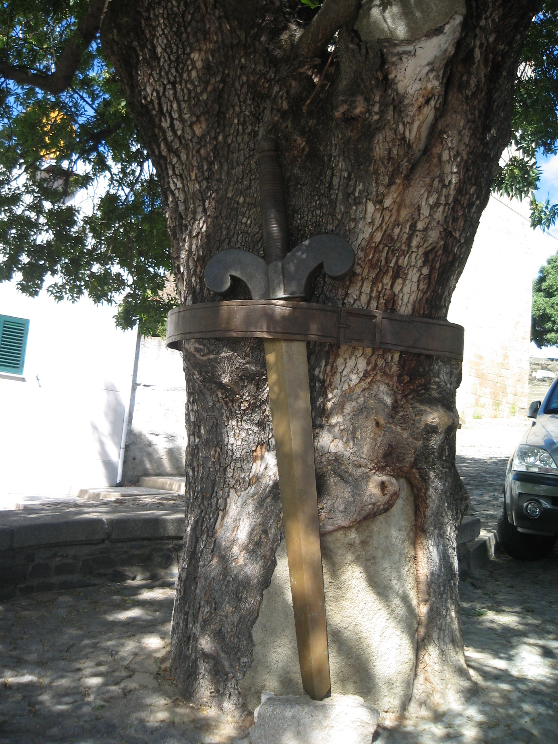 Arvore com espada. Freixo de Espada a Cinta. Distrito de Bragança. This monument is classified as Monumento Nacional. This file was uploaded for Wiki Loves Monuments in Portugal with the unique identifier 70453.